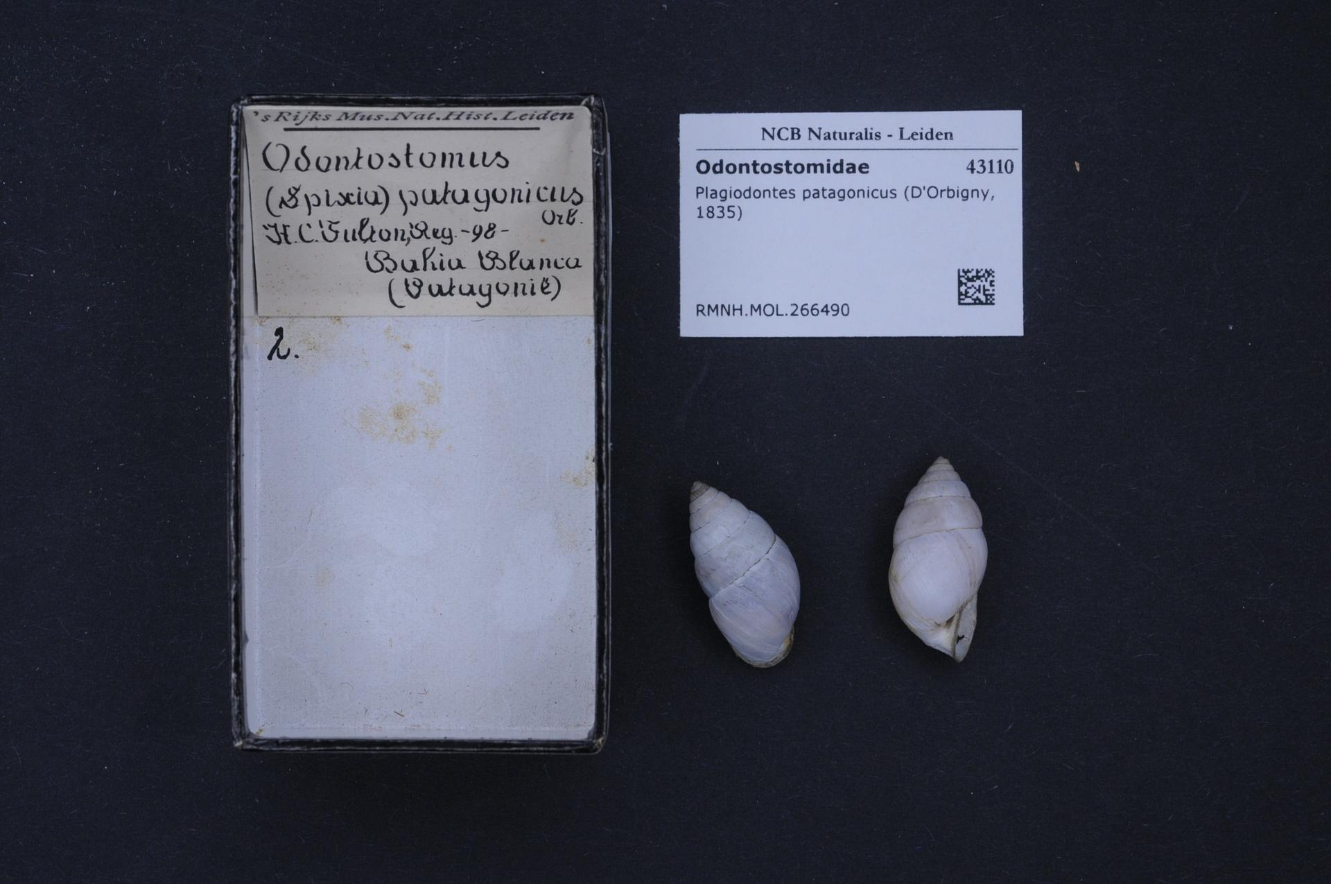 Plagiodontes patagonicus (D'Orbigny, 1835)